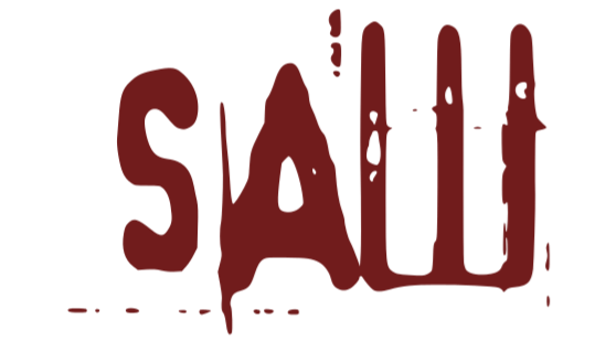 Saw logo